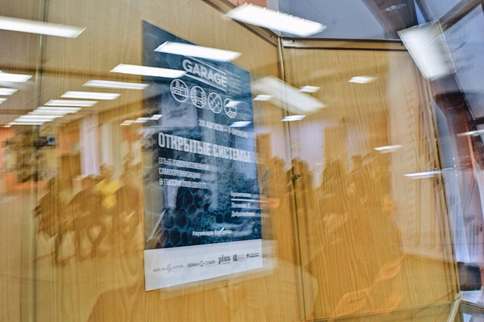 Выставка "Открытые системы" в АОНБ им. Н. А. Добролюбова (Архангельск)